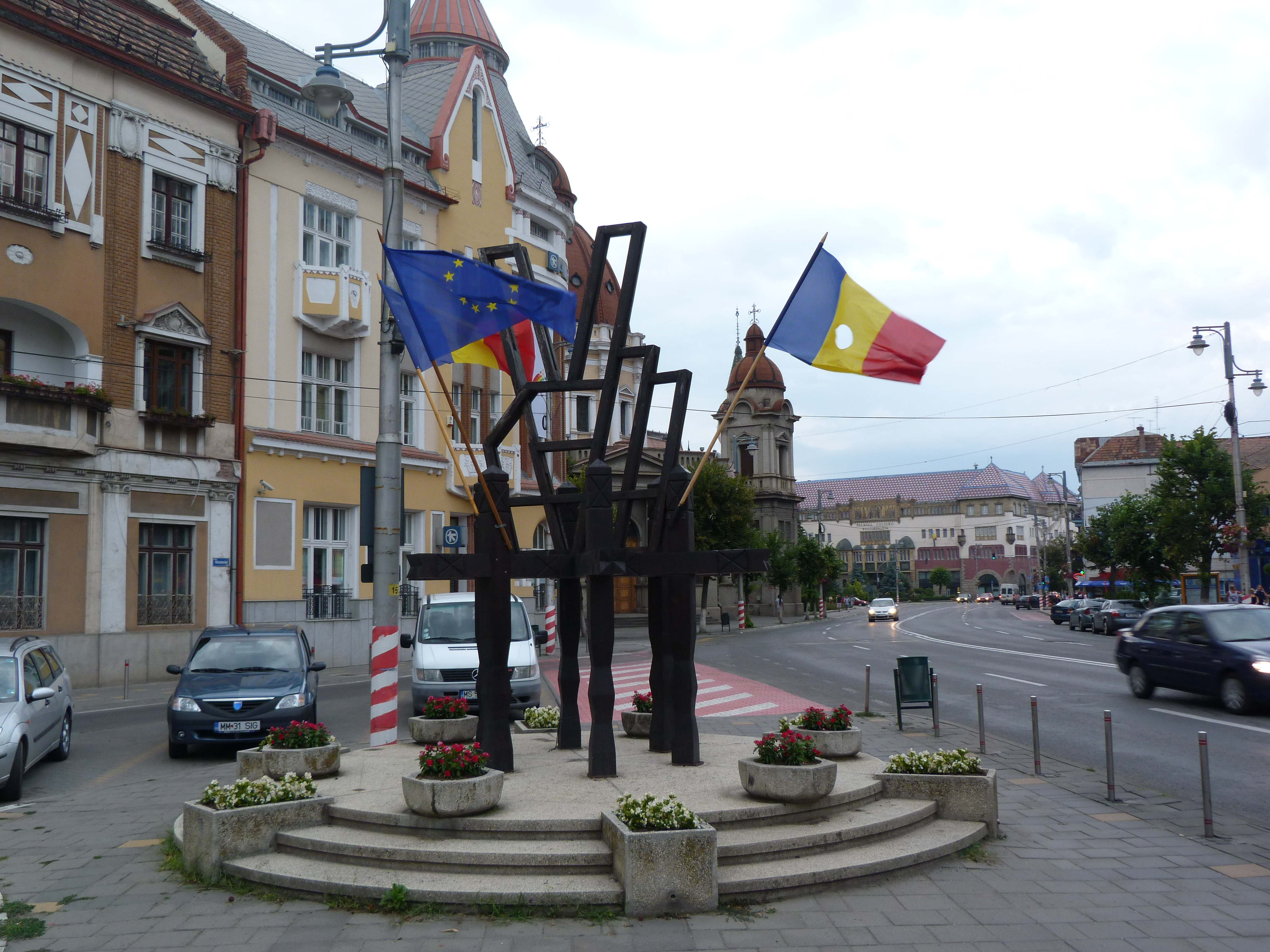 A felvétel 2013. július 11 -én csütörtökön készült Marosvásárhelyen. 1990. március 15 -e emlékmű. ©© Published under Creative Commons in the Metapolisz DVD line. All of the photos and vids in the Metapolisz DVD line are under Creative Commons and can be used even for commercial – for profit – purposes. Recommended Citation Derzsi Elekes Andor: Metapolisz DVD line